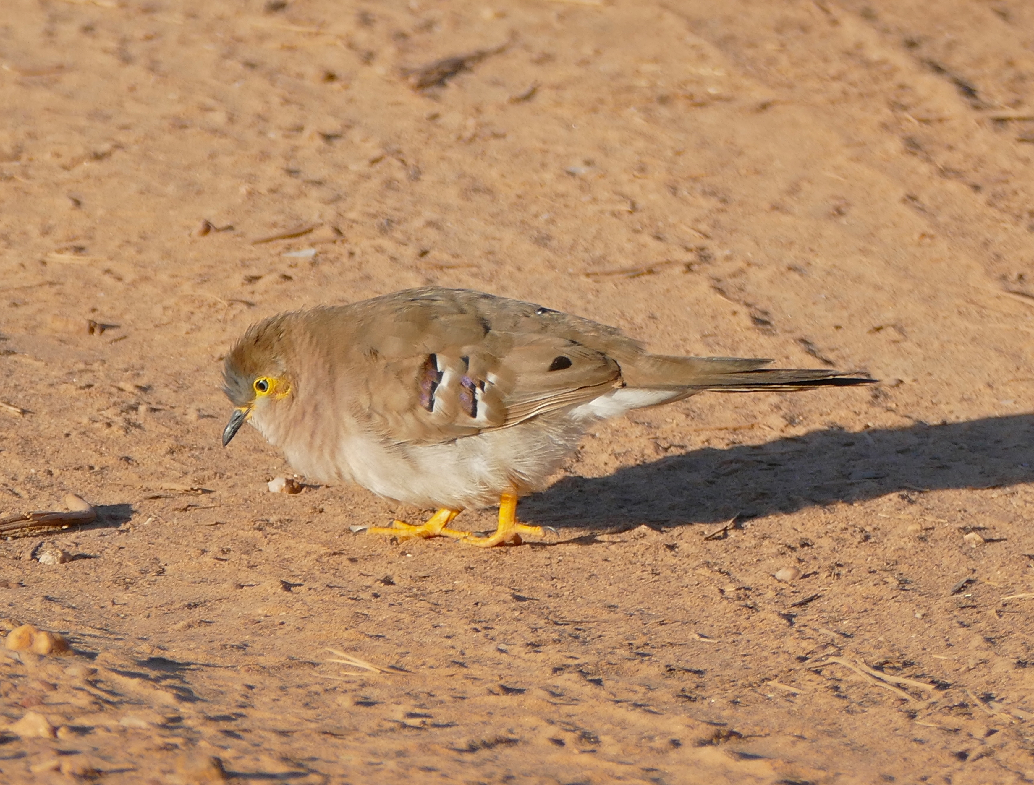 Pouso Alegre, Transpantaneira, Poconé, Mato Grosso, BRAZIL